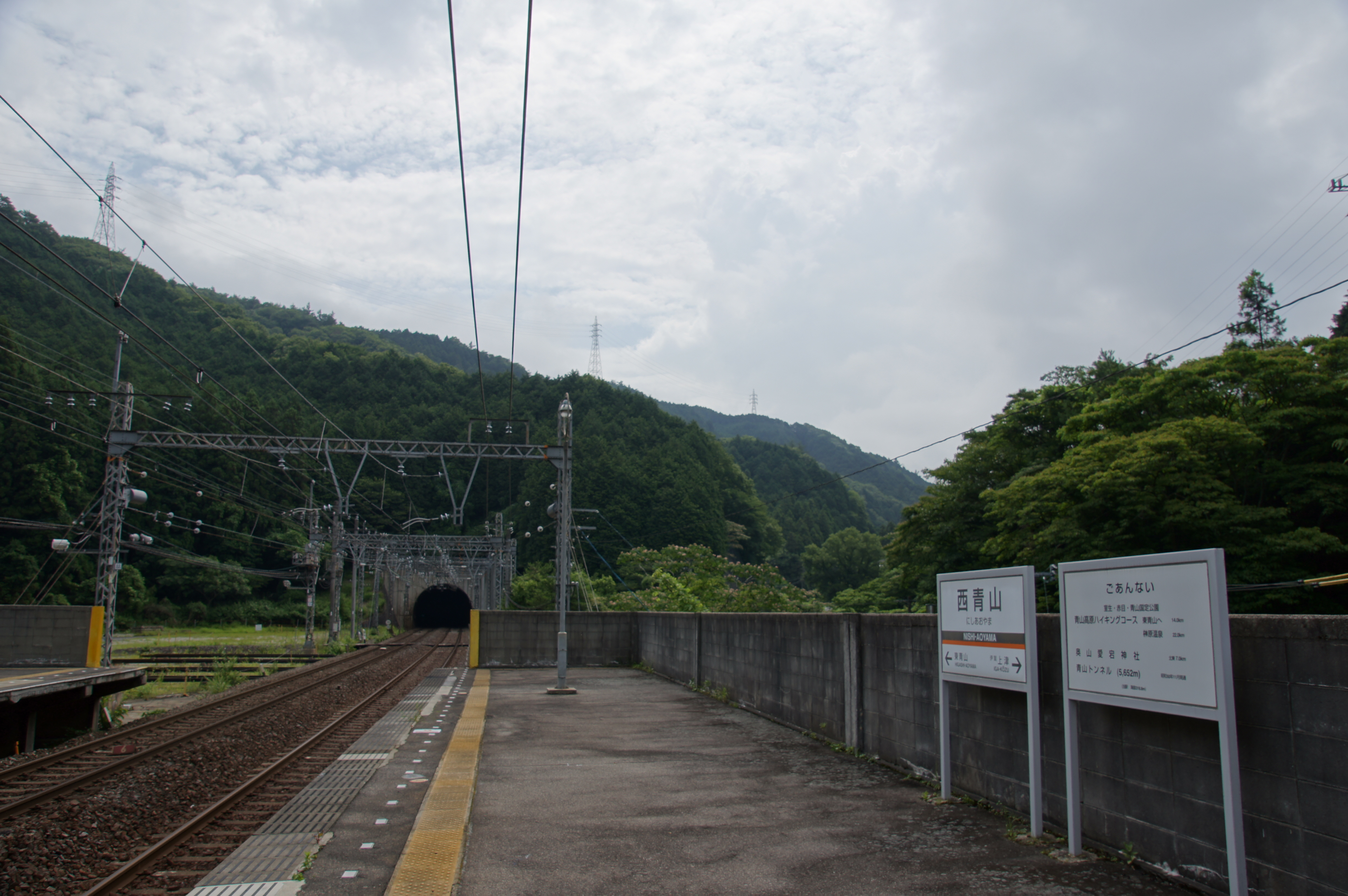 西青山駅上りホームより。